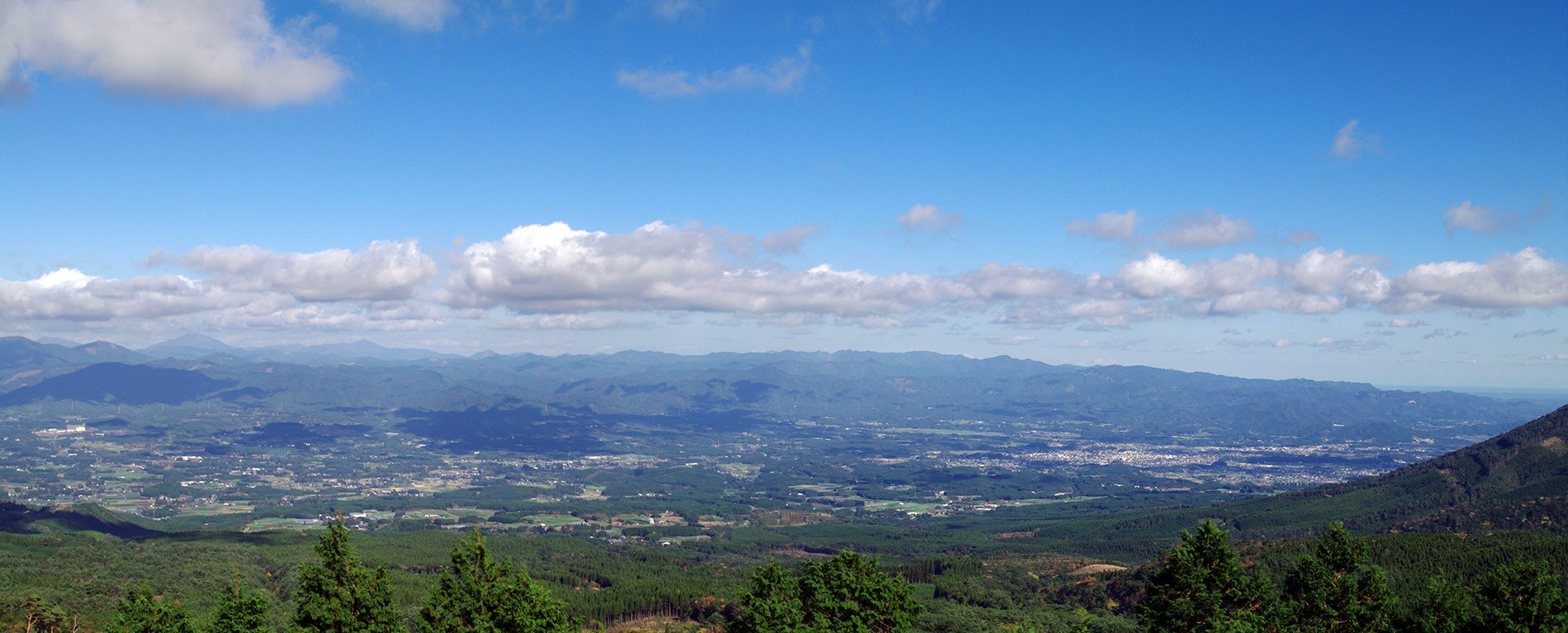 宮崎県道・鹿児島県道1号小林えびの高原牧園線 えびの高原北展望